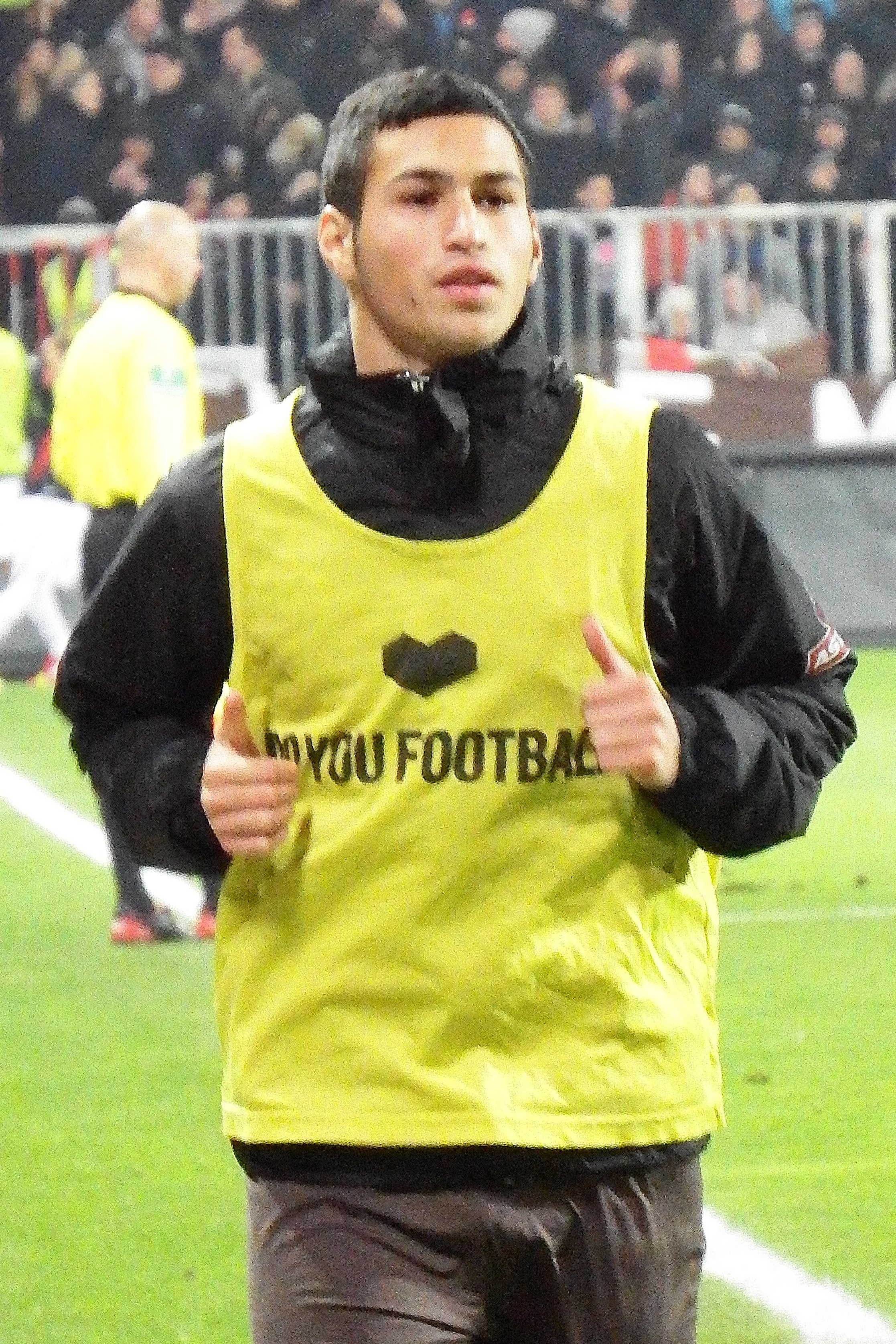 Kurt, Okan S FCSP